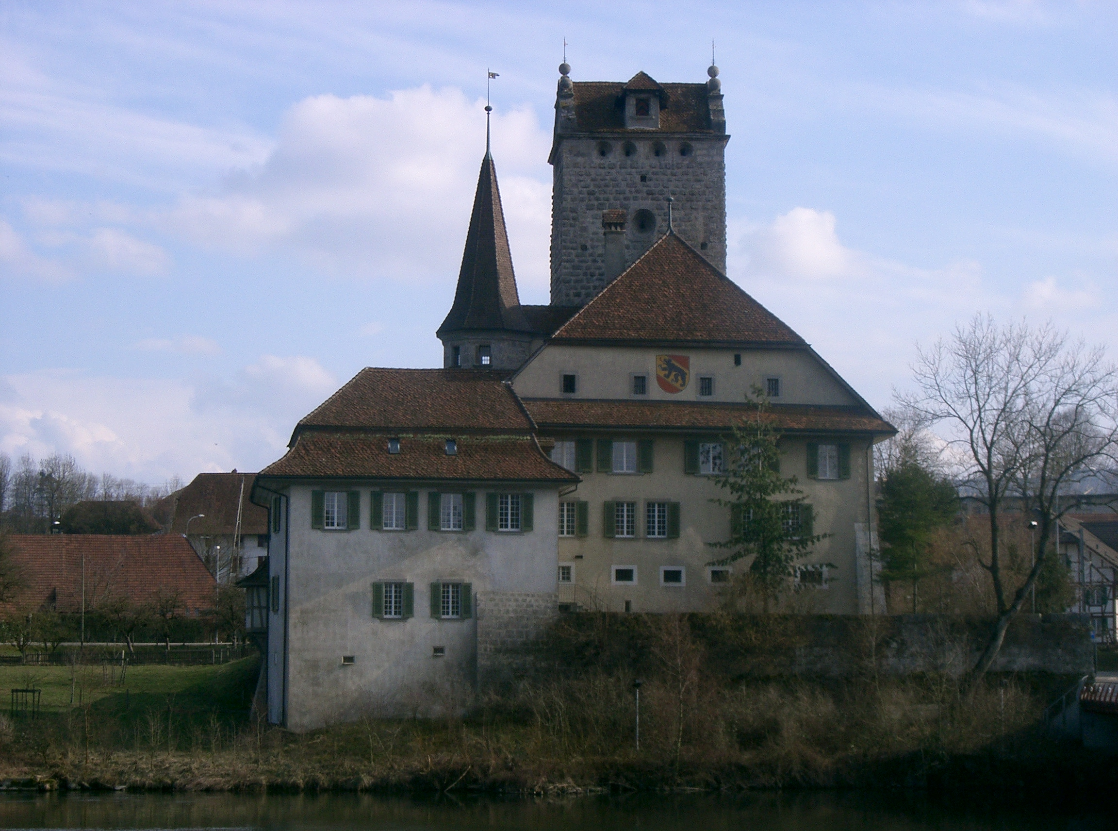 Schloss Aarwangen